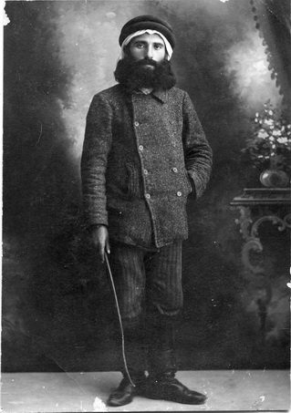 סעדיה פז חבר "השומר" קבוצת הכיבוש במרחביה ומוכטר מרחביה 1912 - / קואופרציה